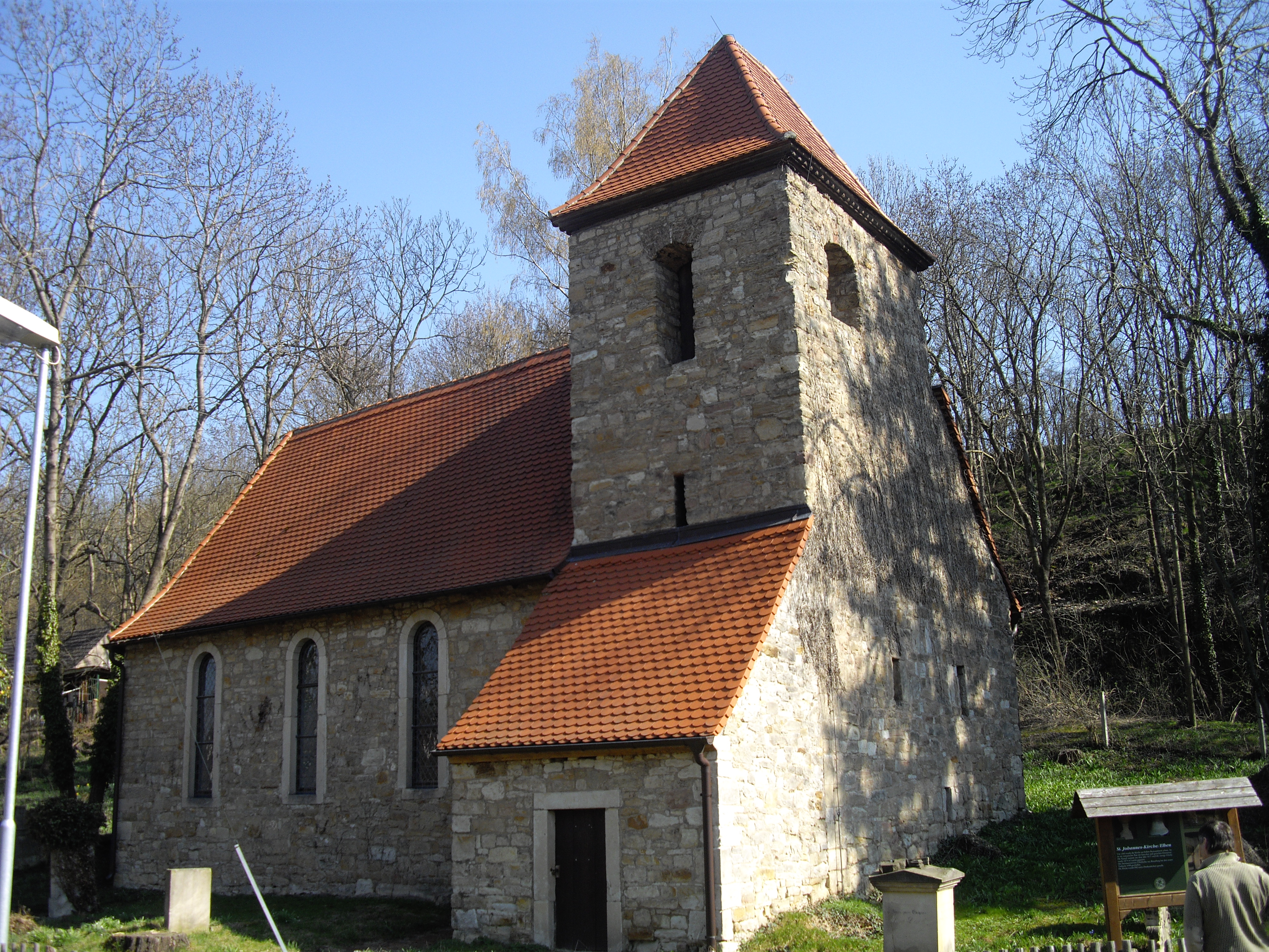 Die Dorfkirche in Elben, Landkreis Mansfeld-Südharz